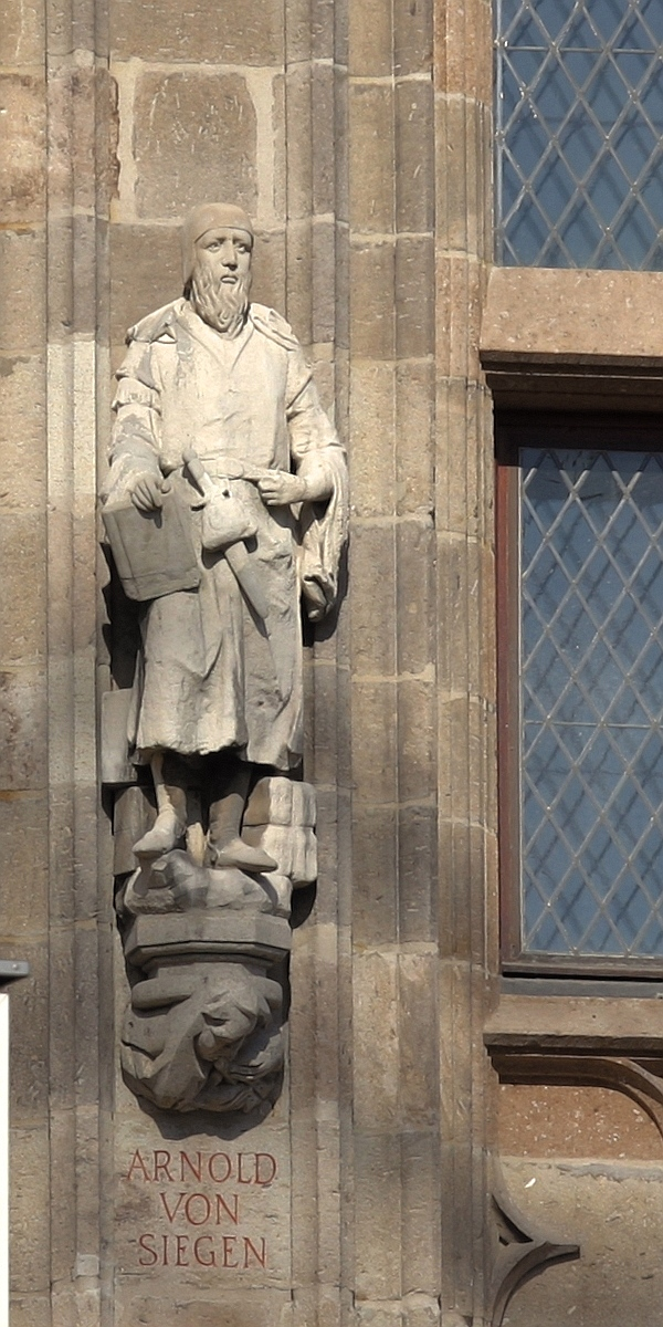 Rathausturm Köln mit der Figur des Arnold von Siegen Details zu der Statue: Bildhauer der Arnold-Statue: Originalfigur, vermutlich Wilhelm Albermann. 1990 durch Georg Krautkrämer restauriert Details zu der Konsole: Thema der Konsole unter der Agilolf-Statue: „Euterpe“. Bildhauer: Heribert Calleen